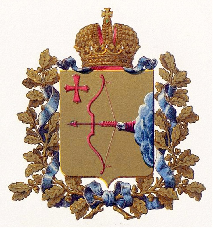 Official Russian Empire coat of arms Viatka Governorate. Герб Российской Империи Вятской губернии в Гербовнике Министерства внутренних дел Российской Империи. Утверждён Императором Всероссийским Александром Вторым.